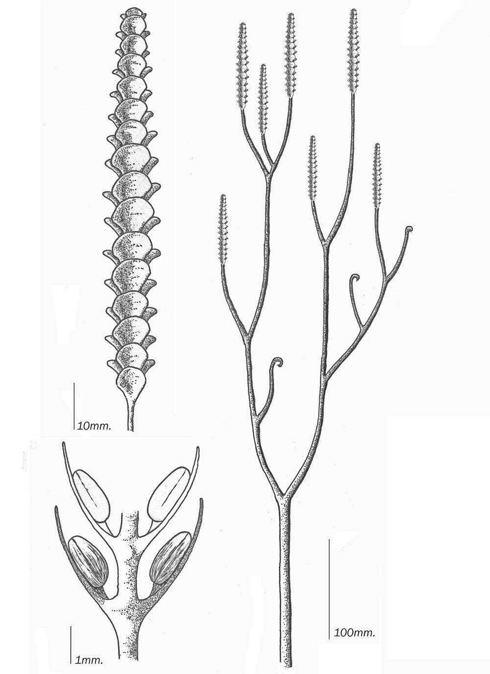 Reconstrucción ideal del vegetal Adoketophyton conocido a partir de sus restos fósiles en rocas del periodo devónico. Se muestra una aproximación de su esporofito con las proporciones de la especie Adoketophyton subverticillatum que poseía un estróbilo de unos 90 milímetros de longitud. Se muestra un detalle de este estróbilo con multitud de brácteas ovaladas de inserción lateral, opuesta y decusada en cuatro verticilos respecto al eje. Un tercer diagrama muestra un corte del estróbilo para observat los esporangios conchoides que se desarrollaban en el interior de las brácteas.